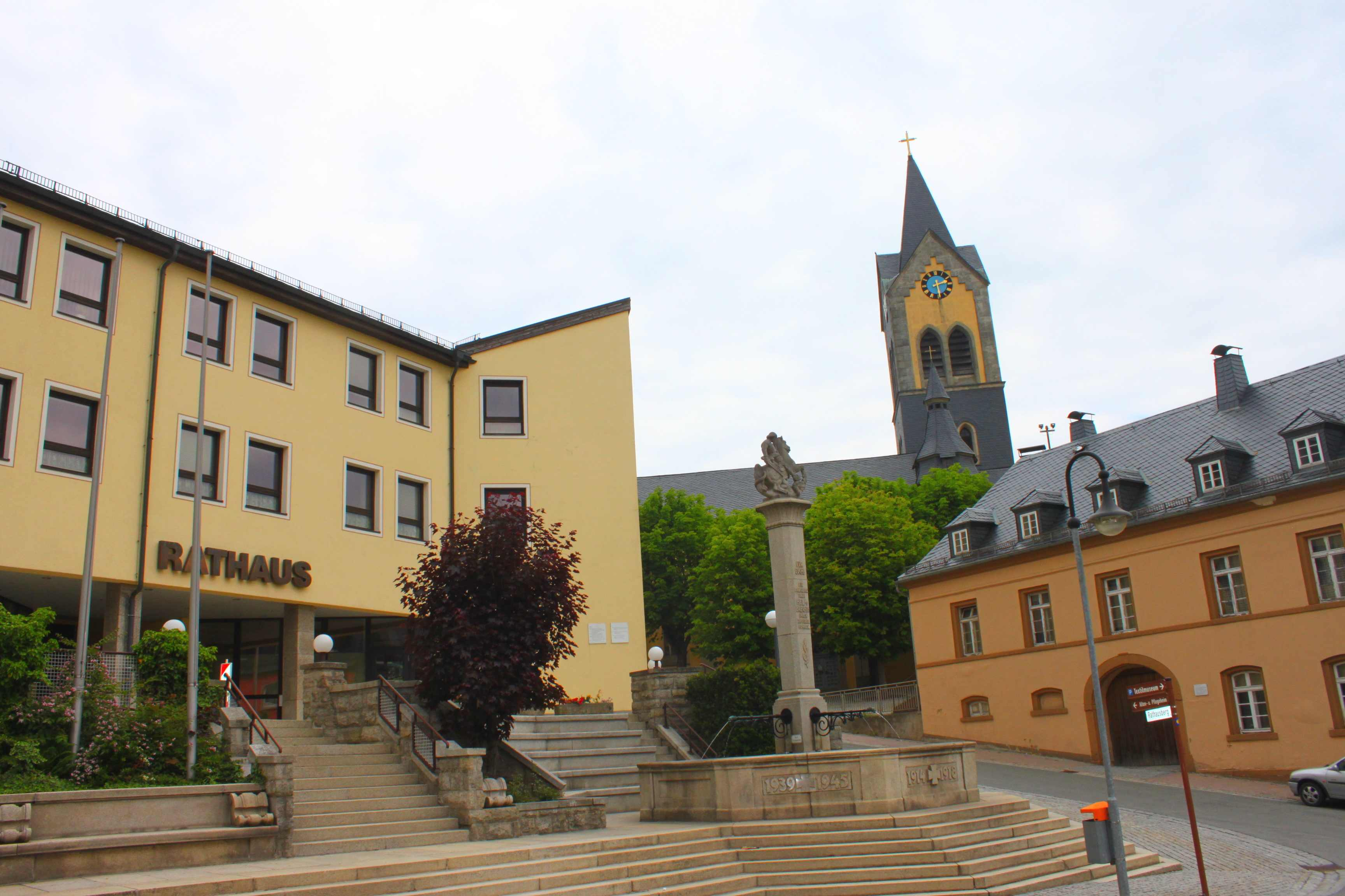 Blick auf das Rathaus und die Kirche im Zentrum